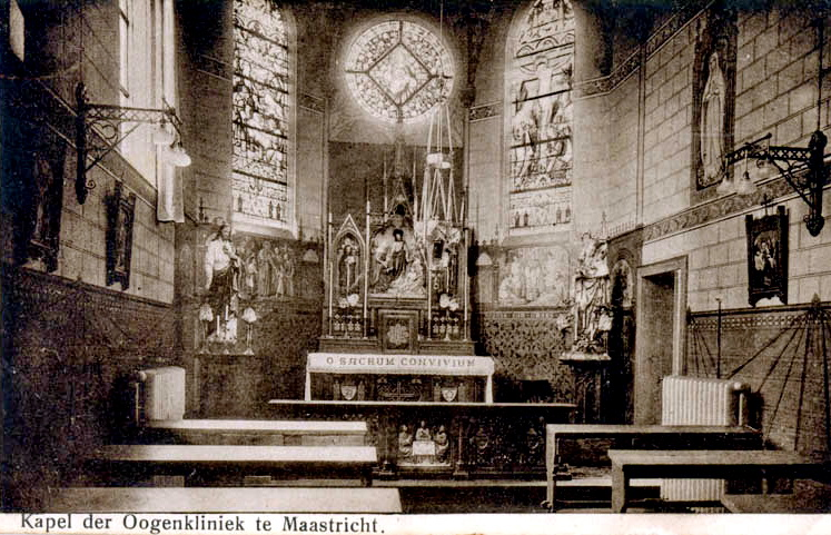 Kapel in de ooglijderskliniek "Licht en Liefde" aan de Prins Bisschopsingel nr. 20 in Maastricht in 1936. Fotocollectie RHCL Maastricht, GAM 17522.